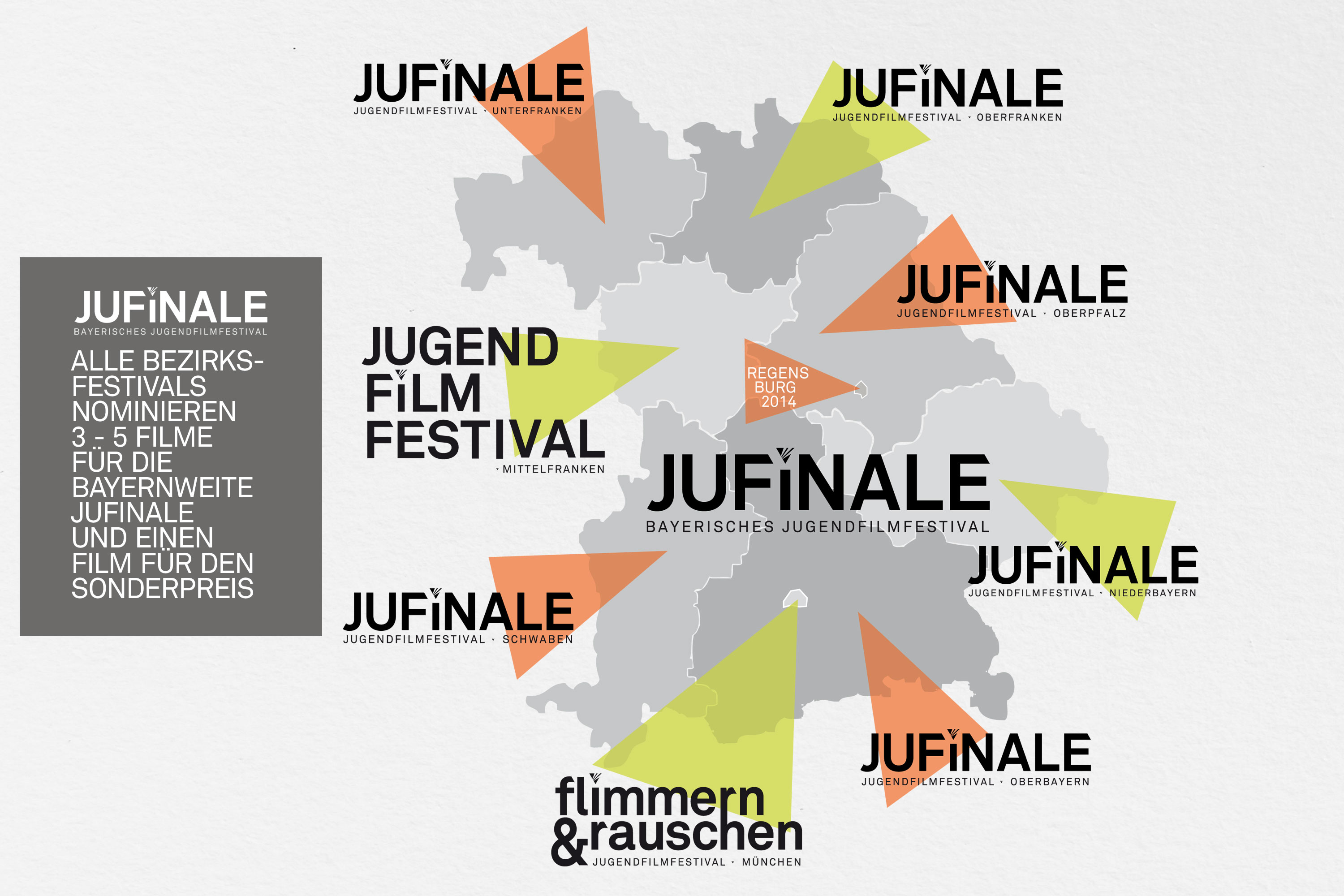 Die verschiedenen Bezirke der JUFINALE